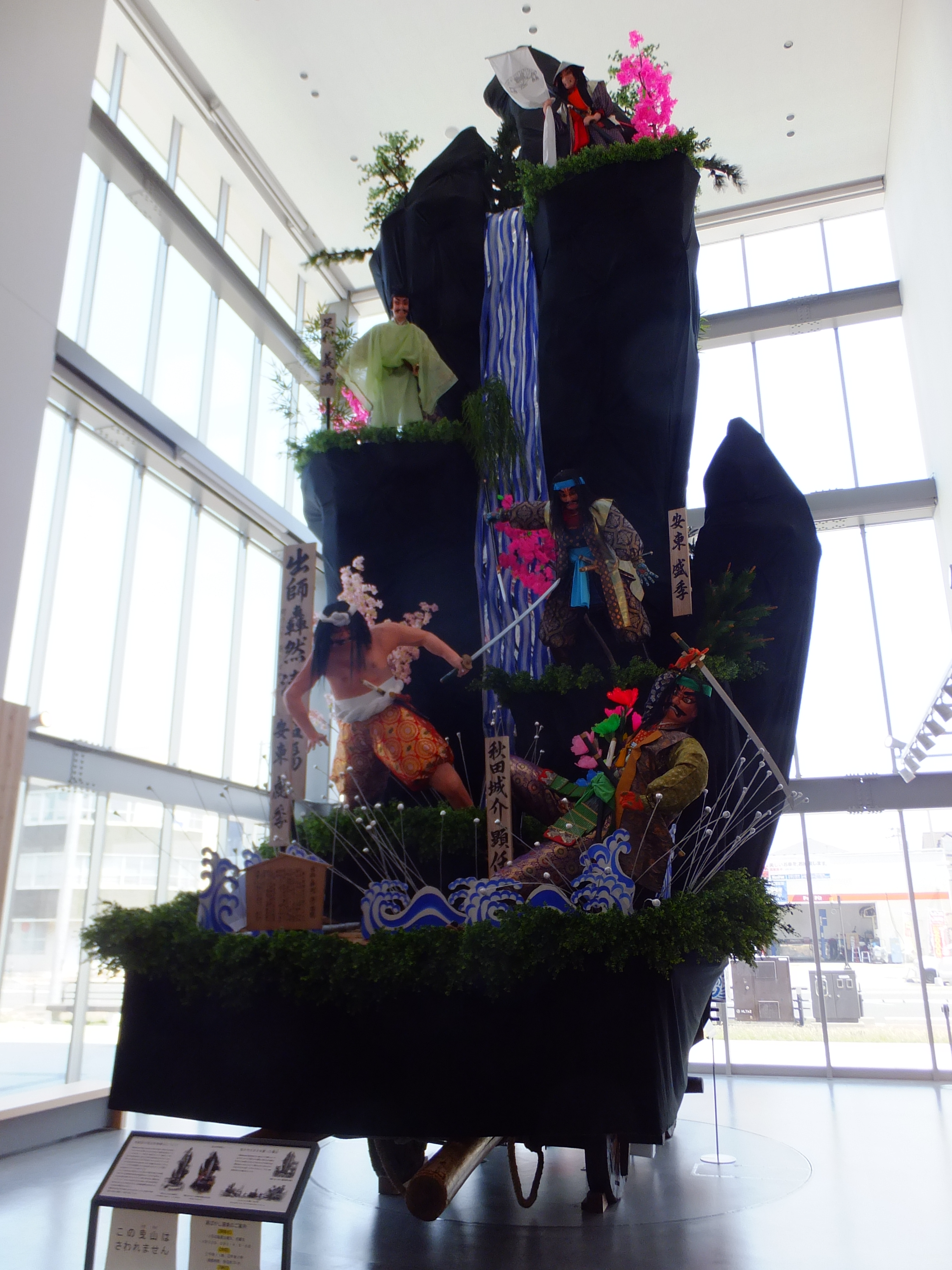 土崎みなと歴史伝承館内にて、土崎港曳山祭りの山車